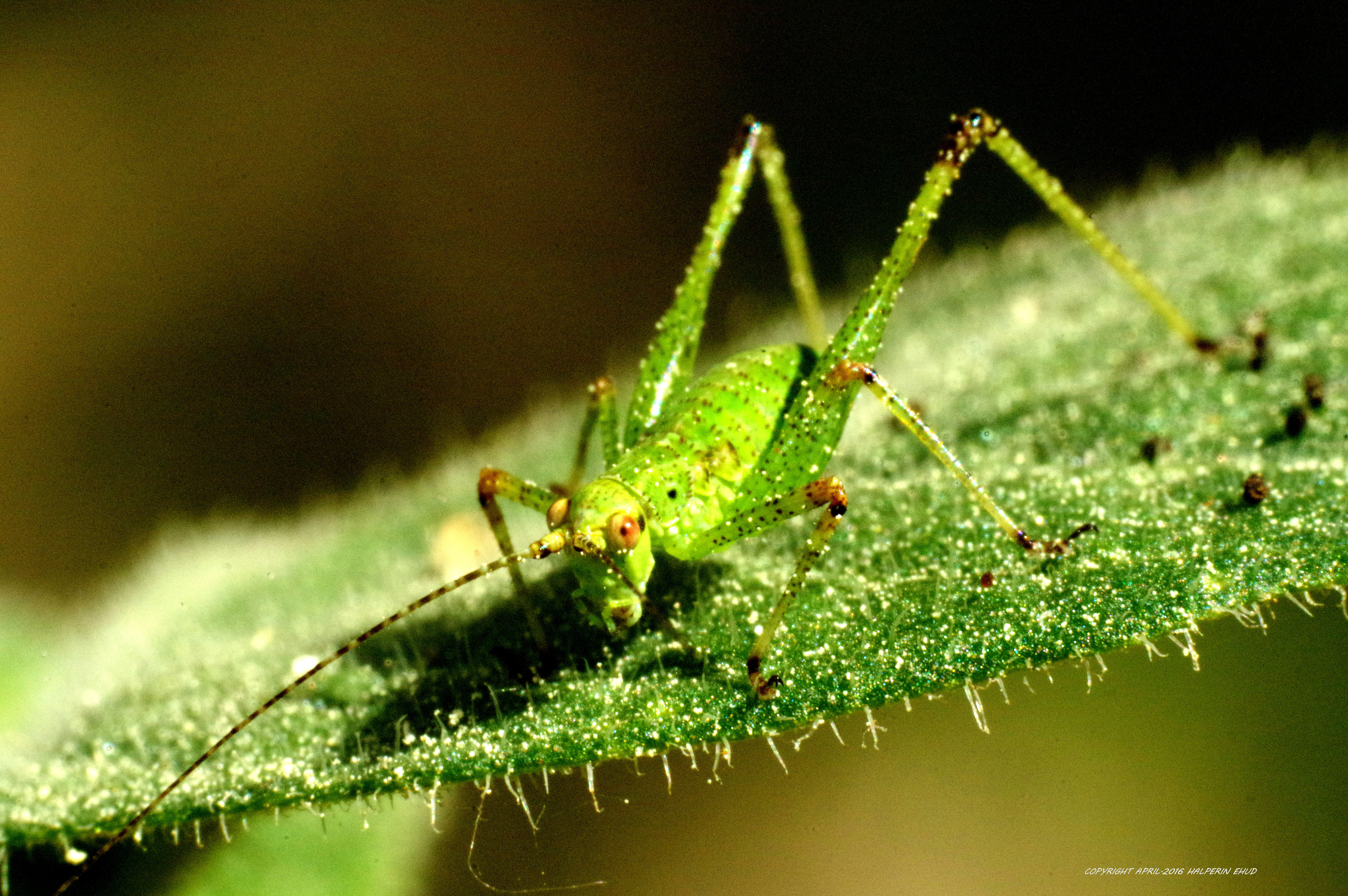 פארק הכרמל הוא כינוי לרצף של גנים לאומיים ושמורות טבע על הר הכרמל הגבוה, המשתרע מגבולותיהן הדרומיים של הערים חיפה ונשר בצפון, ועד אזור נחל מערות ועמק מהר"ל בדרום; שלושה יישובים על רכס הכרמל מהווים מובלעות בתוך רצף שטחי הפארק - עספיא, דלית אל כרמל ובית אורן. גודל הפארק המקורי היה 101,590 דונם, מתוכם 63,950 דונם שהוגדרו כ-"גן לאומי" ו-37,640 דונם הוגדרו כ"שמורת טבע". שטח השמורות משולב בתוך פארק הכרמל כאשר שטחי הגן הלאומי מקיפים את השמורות ויוצרים רצף של שטחים ירוקים.